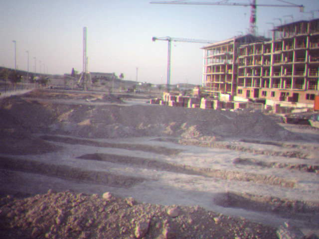 Zona Arqueológica de Marroquíes Bajos. Cortijo Los Robles al fondo.